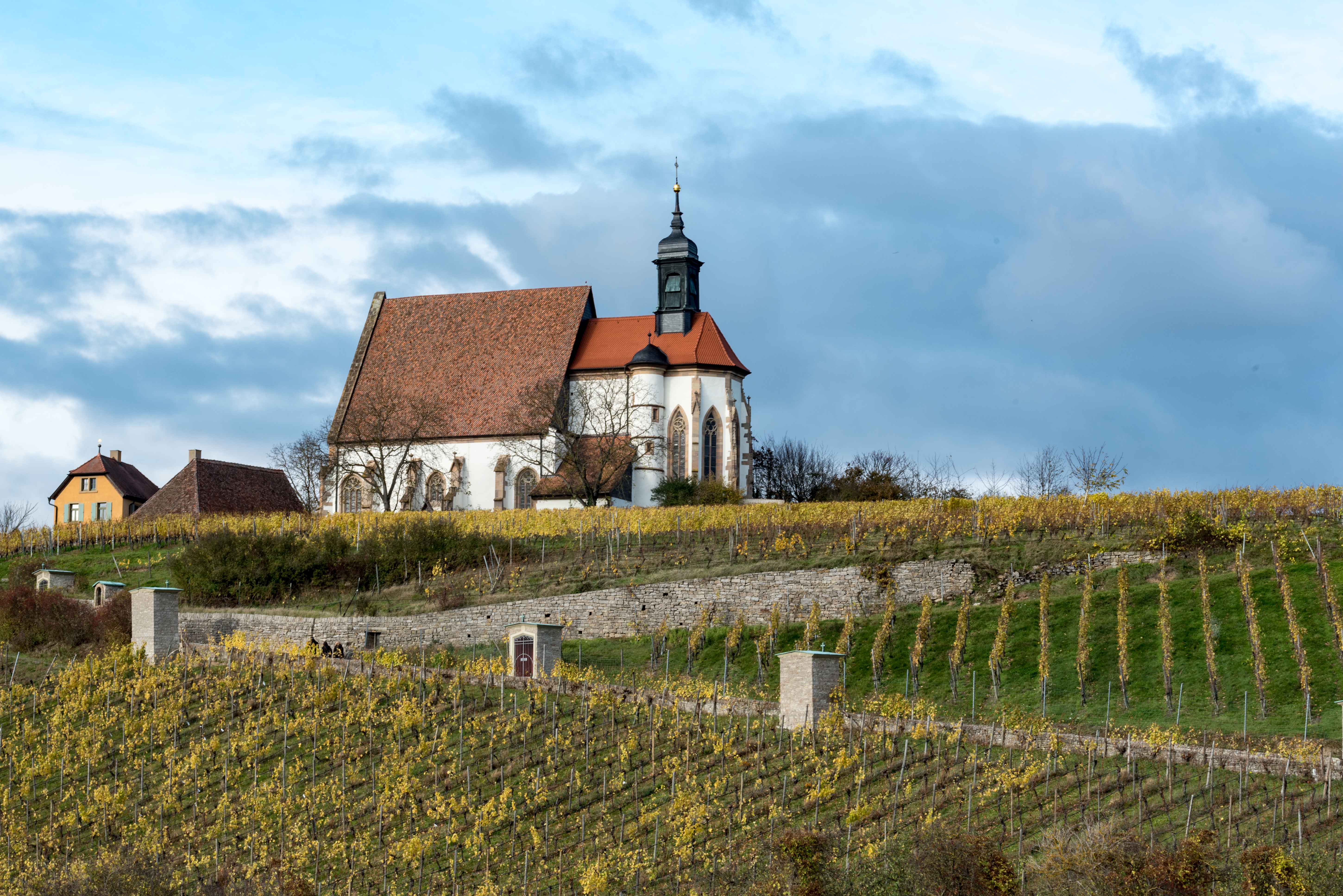 Volkach, Kirchbergweg 20, Wallfahrtskirche